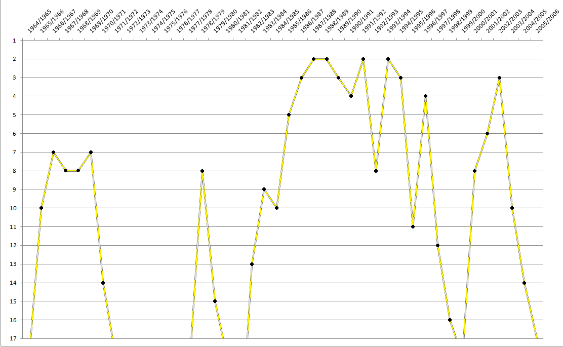 dorobek GKS-u Katowice w Ekstraklasie